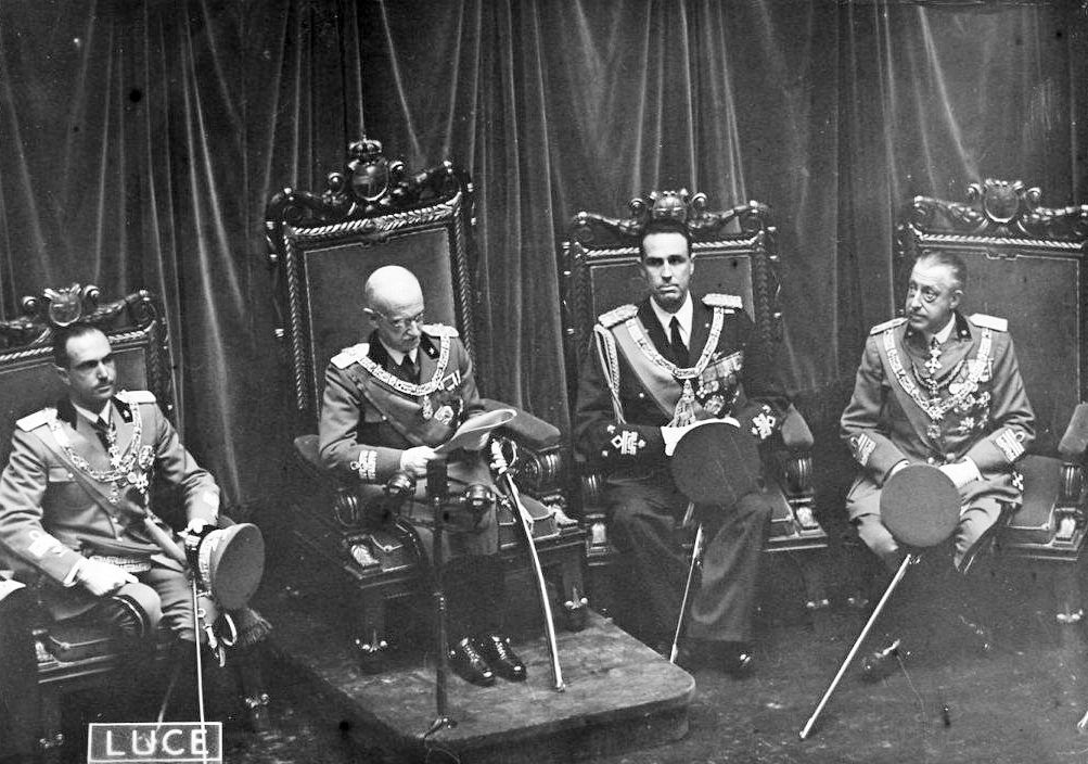 Vittorio Emanuele III inaugura la Camera dei Fasci e delle Corporazioni. Da sinistra: il principe ereditario Umberto, Vittorio Emanuele III, Amedeo duca d'Aosta, Vittorio Emanuele conte di Torino